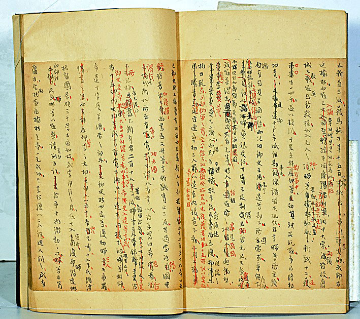 明末清初的万斯同等撰写的《明史稿》，为《明史》底稿之一